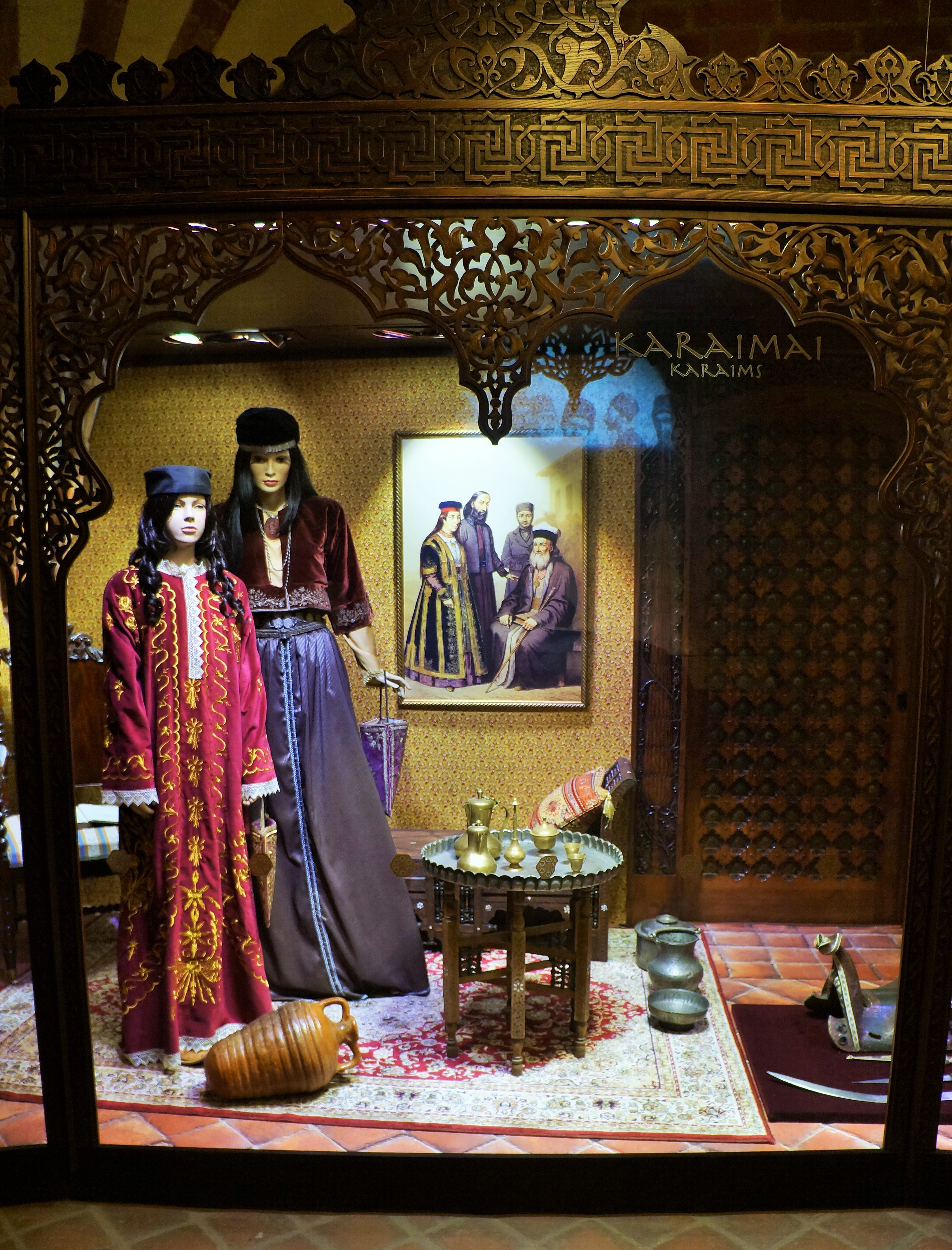 Salle des Tartares lituaniens du Château de Trakai, Lituanie.